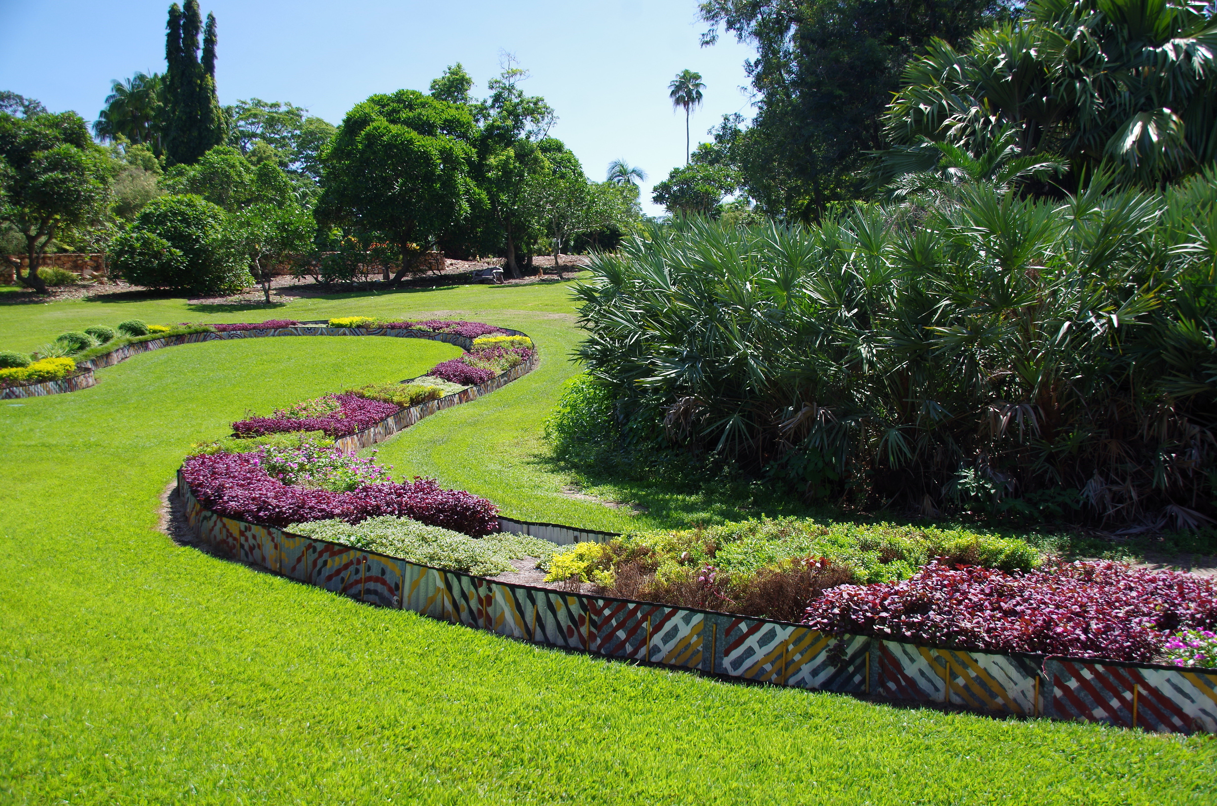 Botanischer Garten Darwin